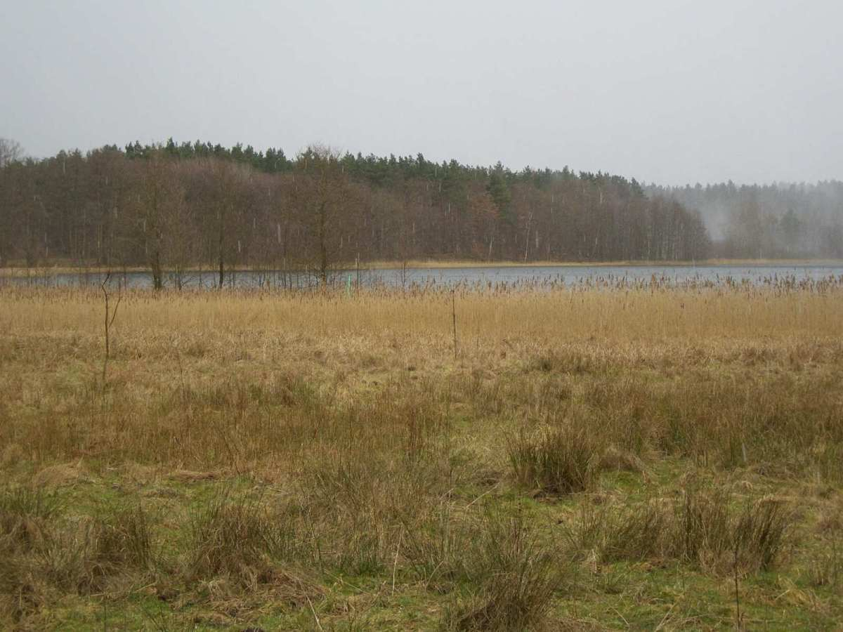 Blick auf den Weutschsee (bei Mechow), Mecklenburg-Vorpommern.